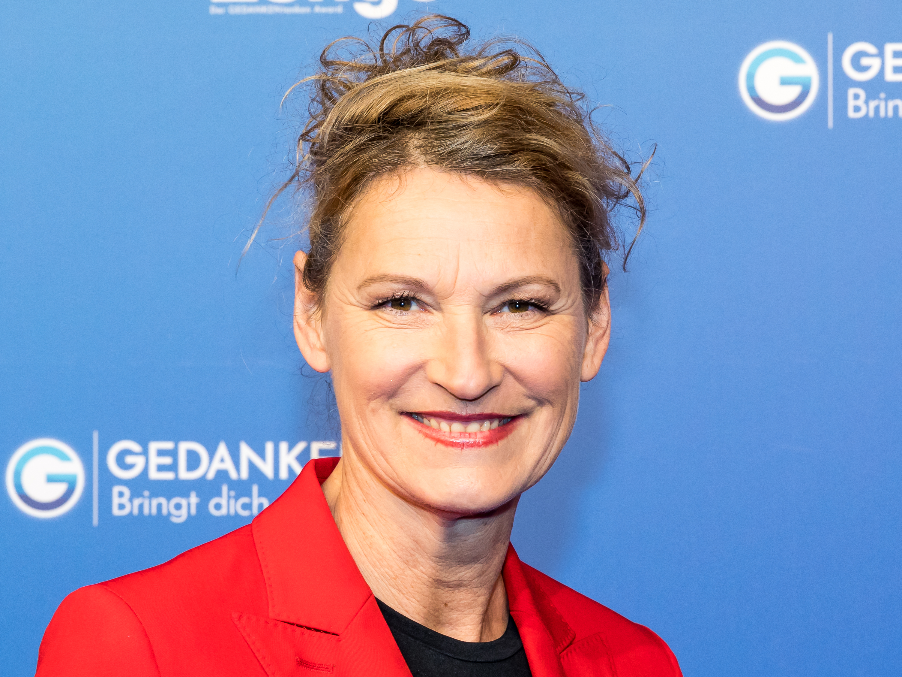 GedankenTanken Köln 2018 - 02 - Roter Teppich, der in blauer Farbe ausgeführt ist. Foto: Heike Meier-Henkel, Leichtathletin